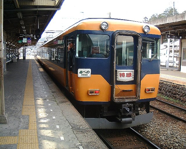 近鉄16000系電車 下市口駅にて